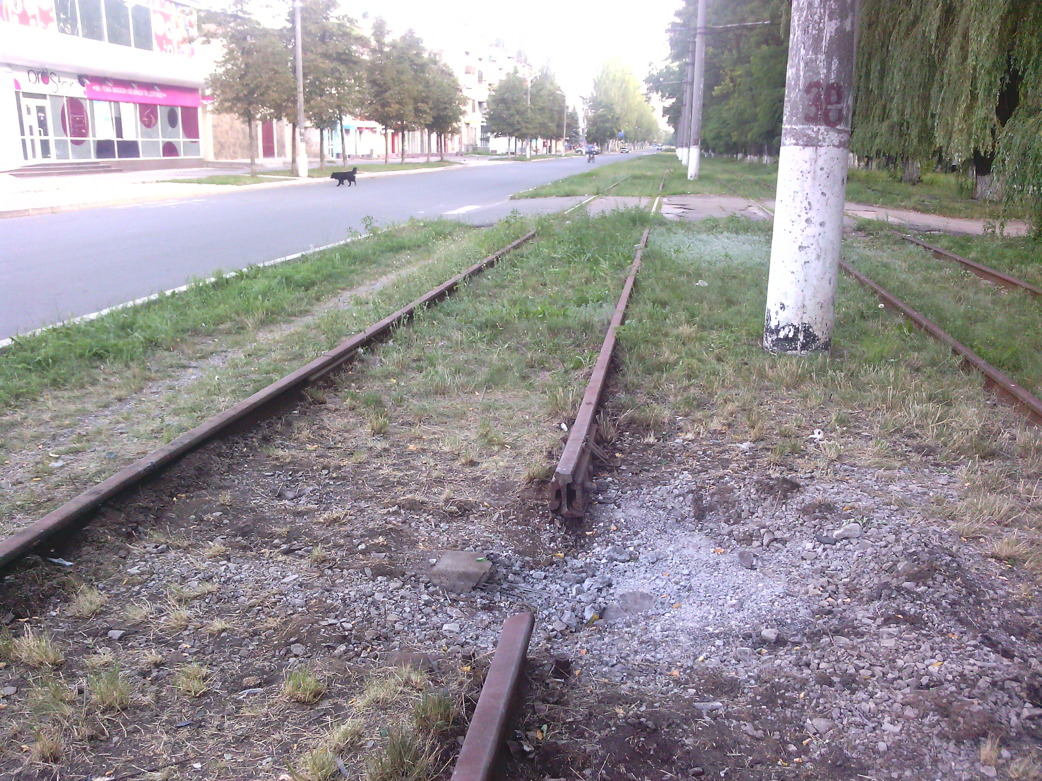 Фото трамвайного полотна Авдіївського трамваю, зруйнованого під час обстрілів бойовиками Авдіївки влітку 2015 року